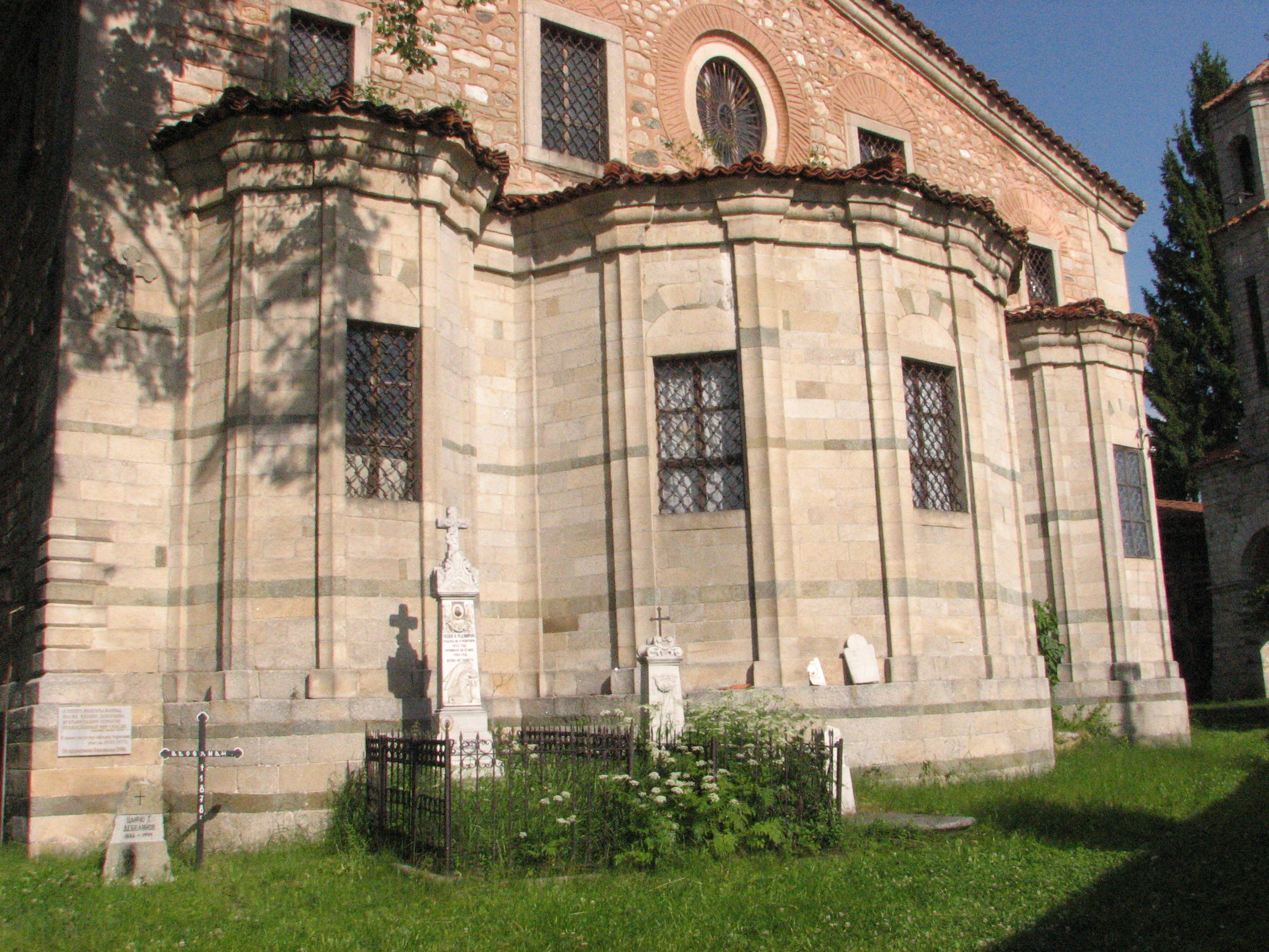 Храм "Свети Николай" Копривщица - фасадата от Изток